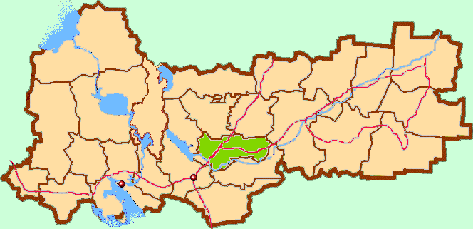 Vologda Oblast map by Al Silonov